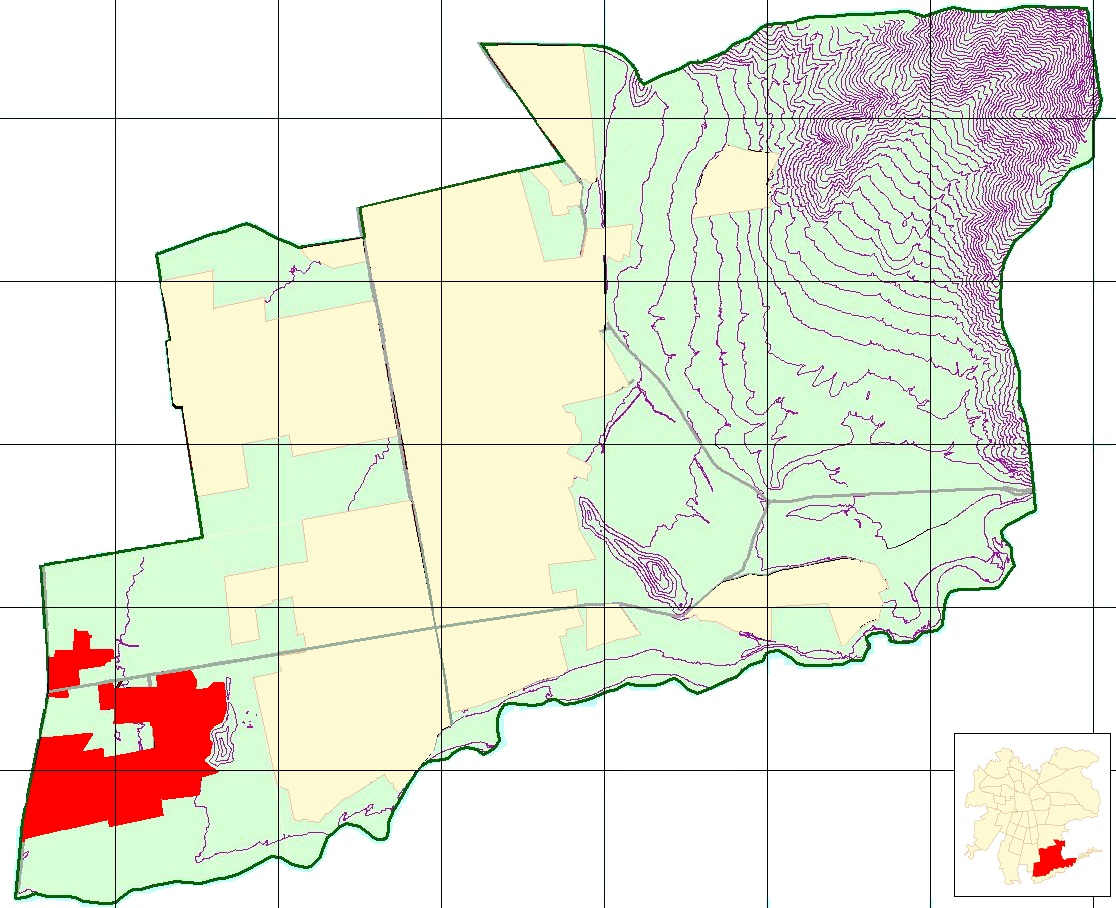 Plano de Puente Alto